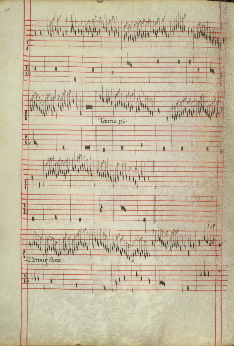 Intabulation De tout flors de G. de Machaut — Codex Faenza, folio 37v.